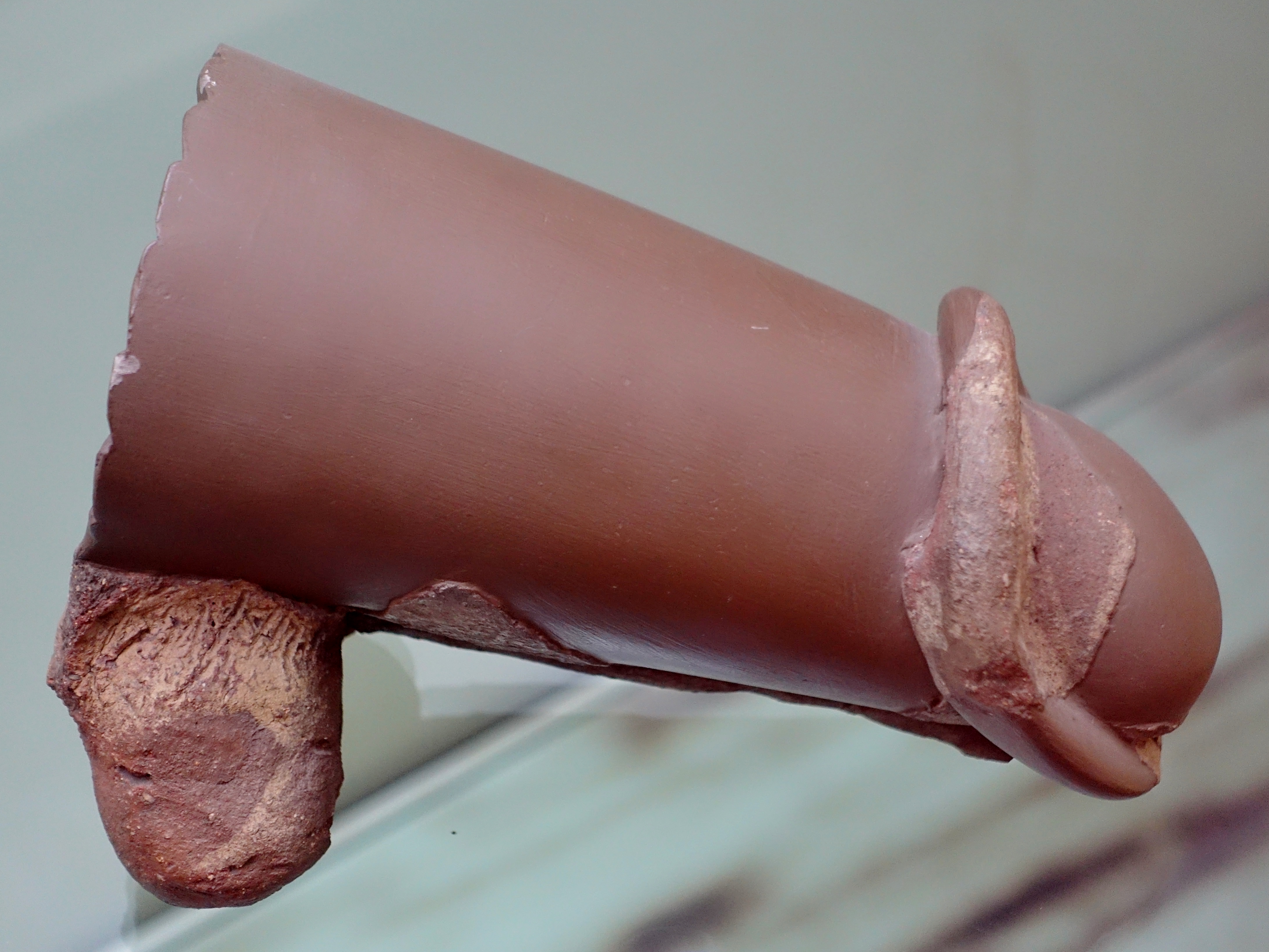 Wasserspeier aus Ton in Phallus-Form (7. Jahrhundert v. Chr.) vom Dach des Heiligtums von Cuccureddus, ausgestellt im archäologischen Museum von Villasimius, Sardinien, Italien